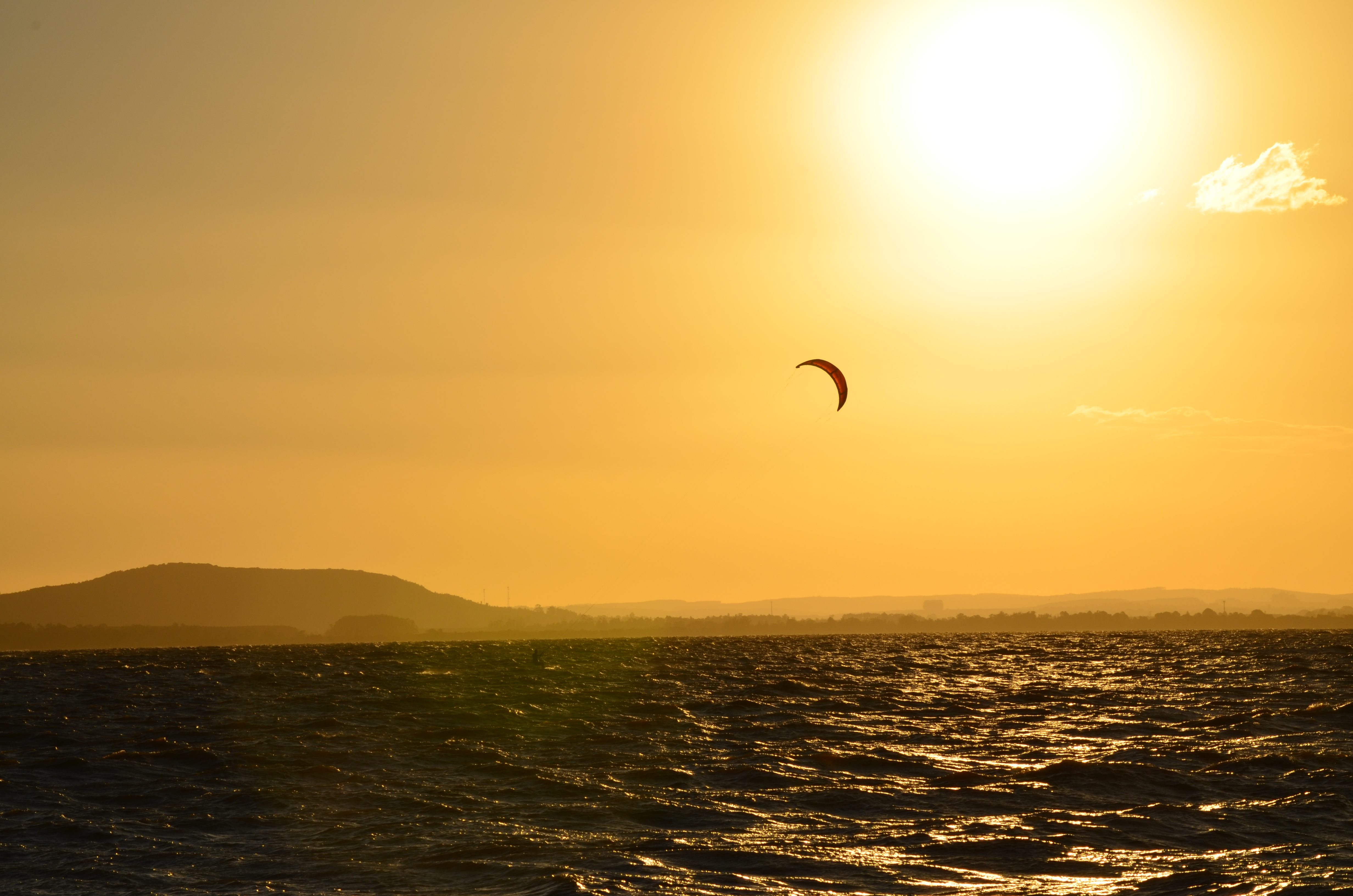 A paz do por do sol do Guaíba em Ipanema, Porto Alegre.